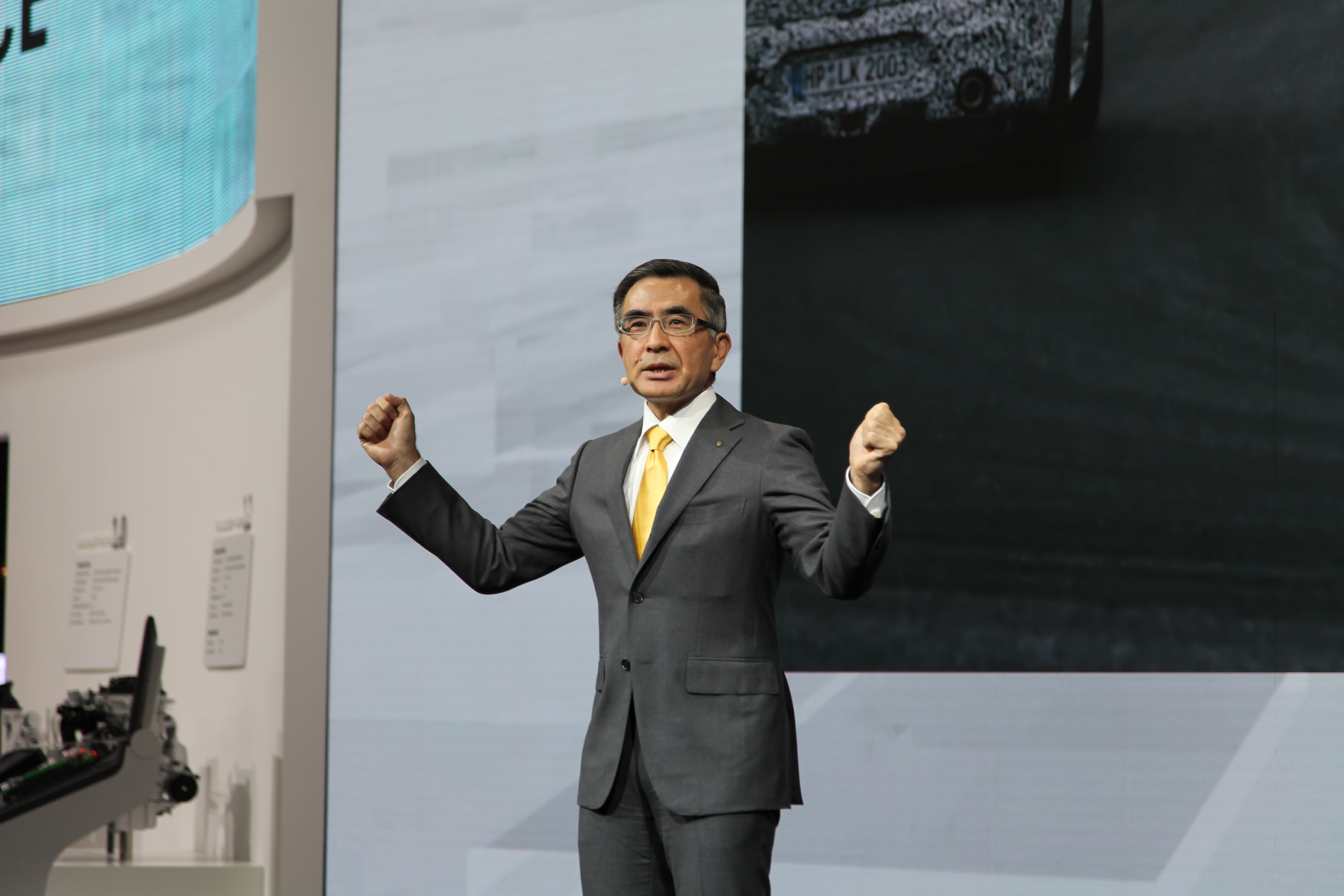 Toshihiro Suzuki, IAA 2017